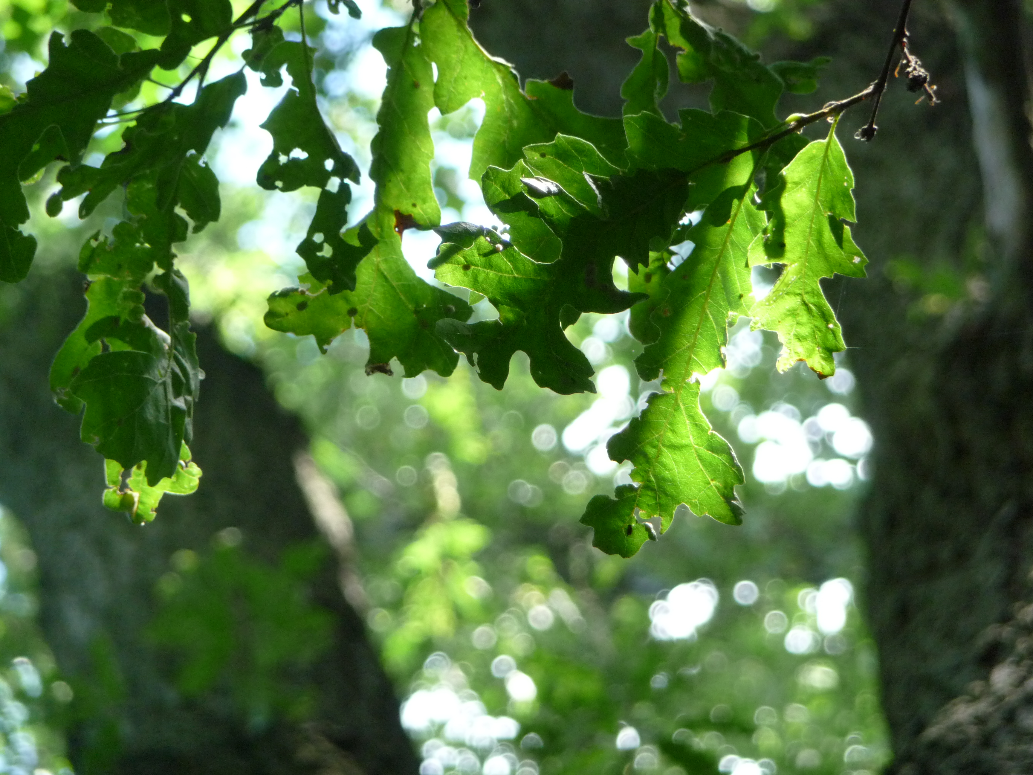 Hollókő, Csertölgy „(Quercus cerris)” levele